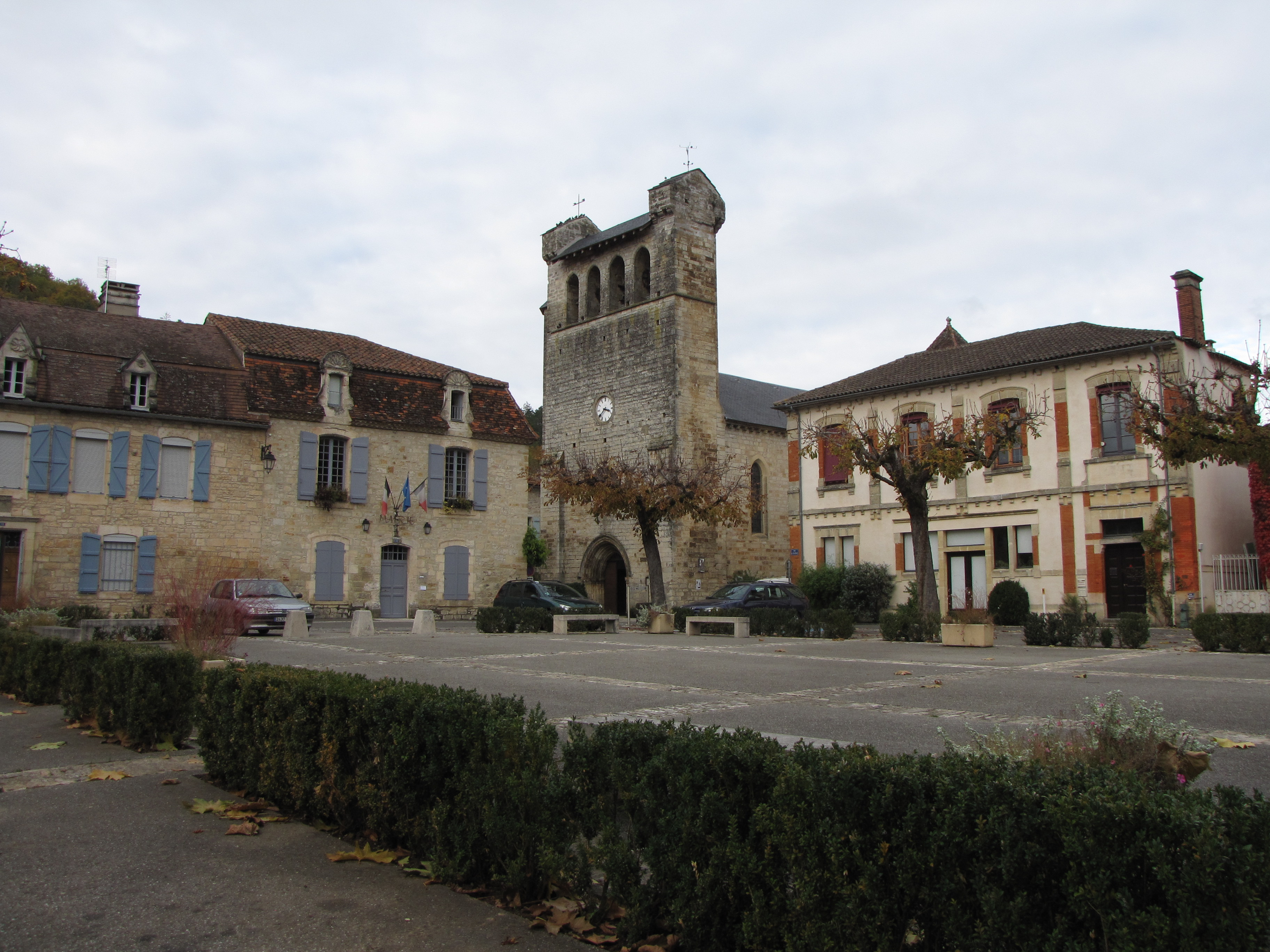 Castelfranc Mairie et église